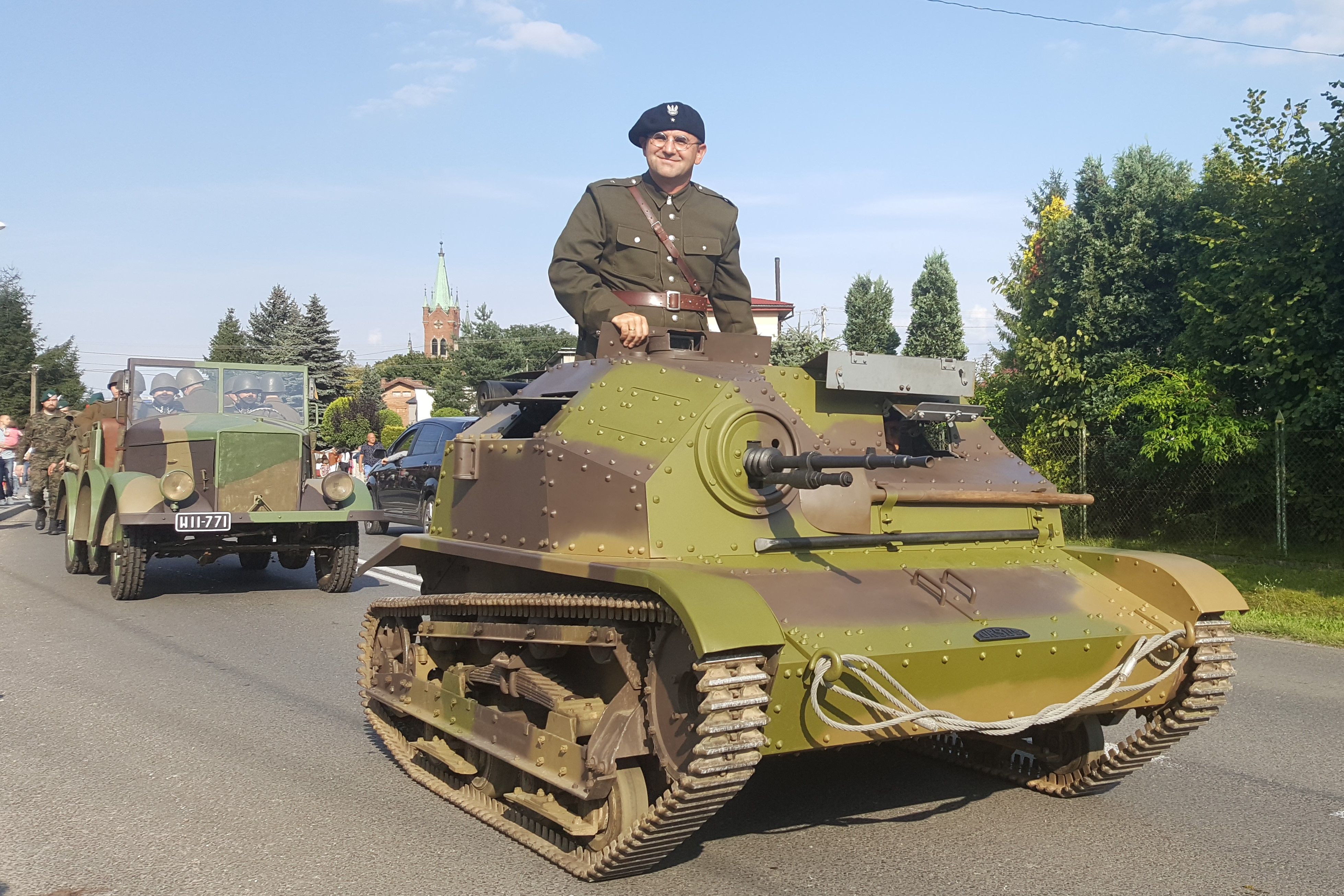 Parada z okazji Święta Wojska Polskiego. Wola Rzędzińska, 15 sierpnia 2019